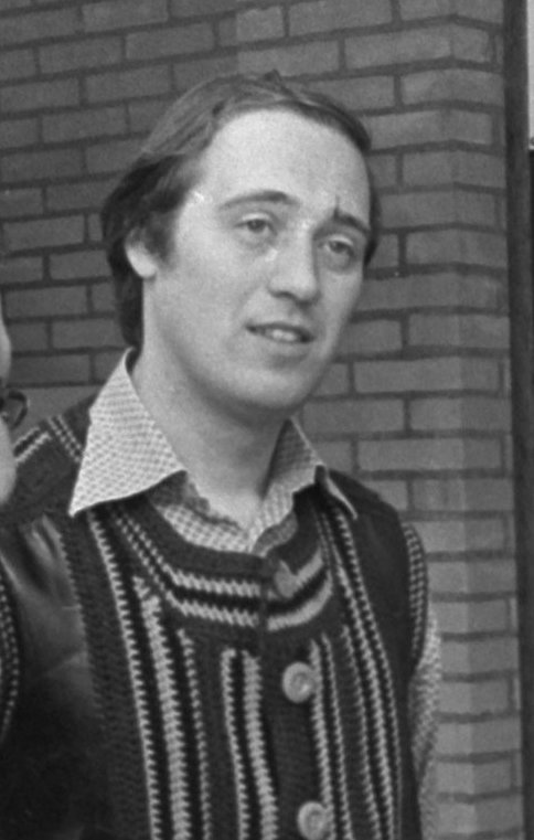 Minister Hans Gruijters (rechts) ontvangt LP van organist Jan Jongepier (midden) uit handen van burgemeester J.A.C. van Burg van Purmerend